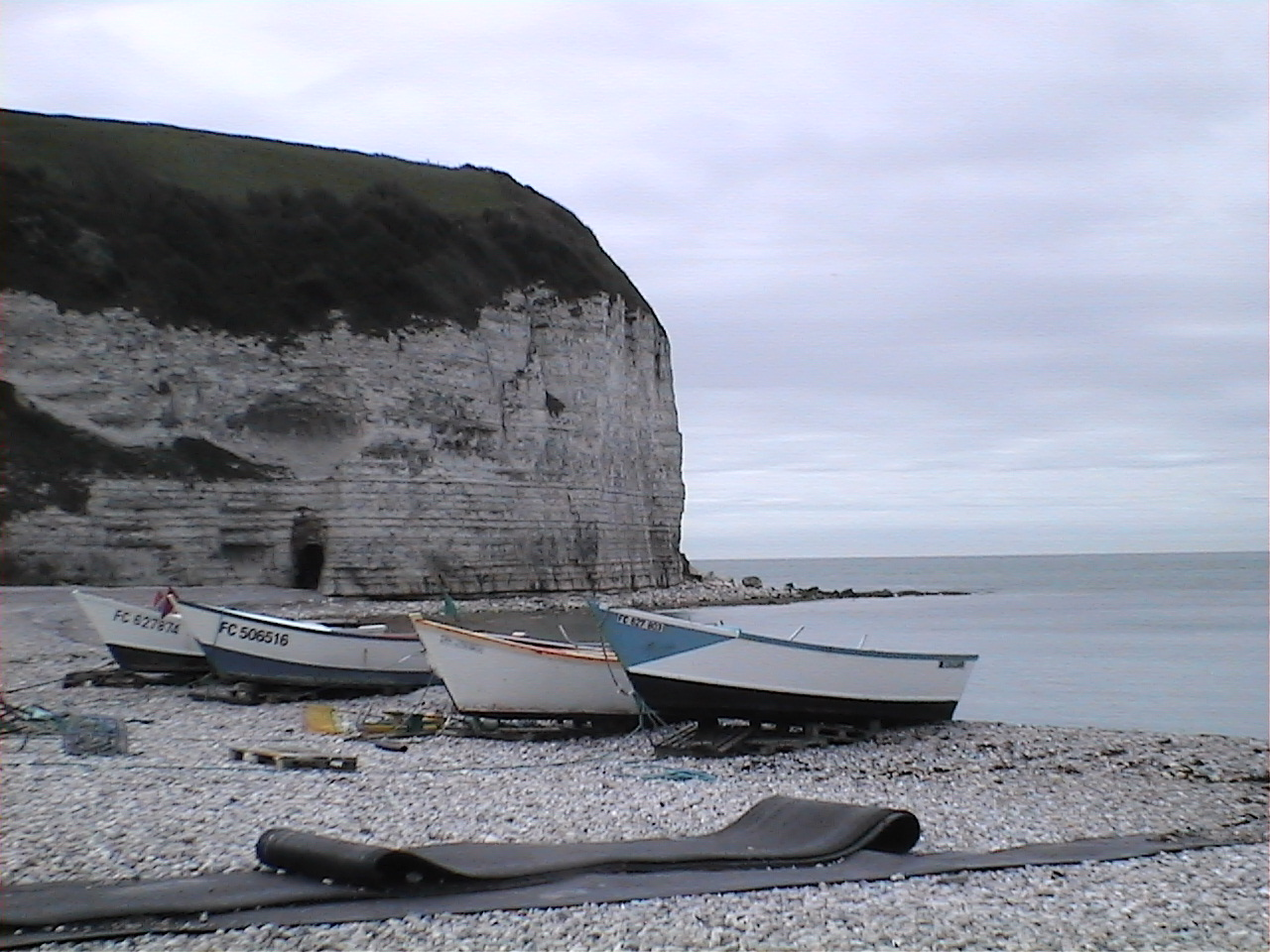 Falaise d'aval d'Yport